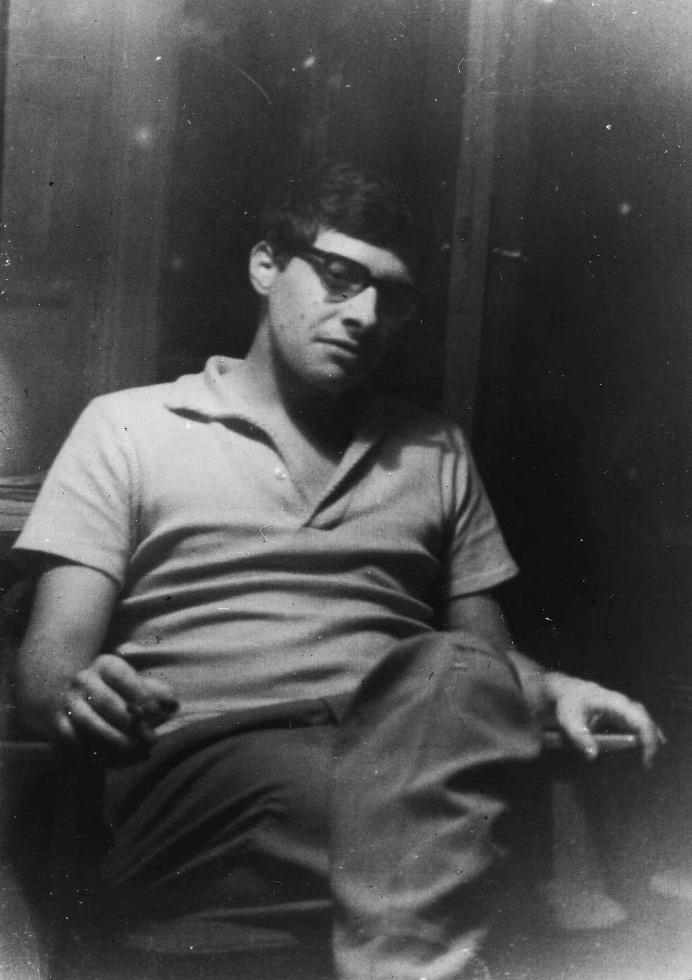 Jerzy Vetulani, pierwsza połowa lat 60.